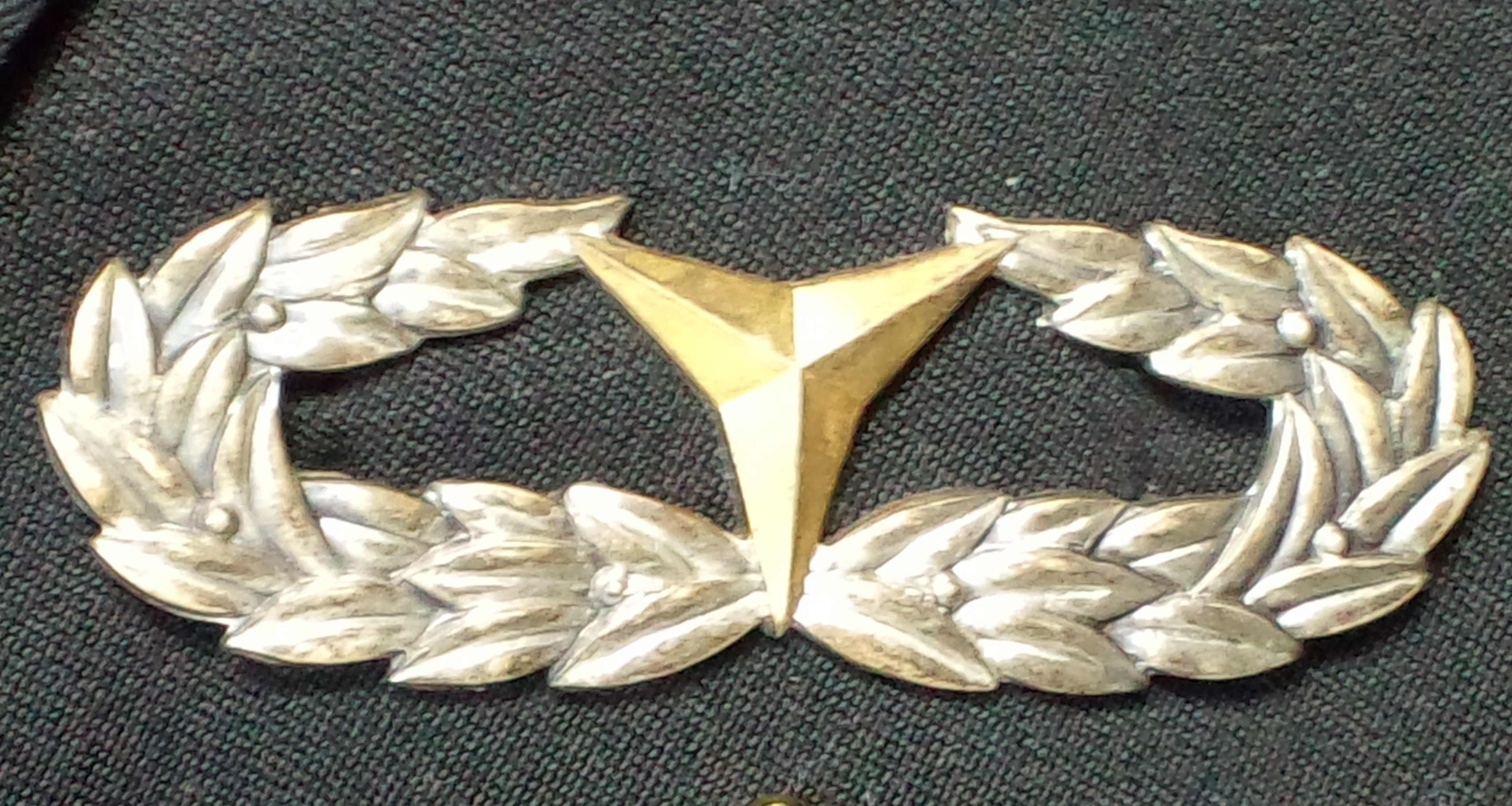 体力水泳1級き章